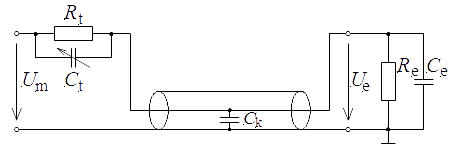 Innere Schaltung eines Standard-Tastkopfes